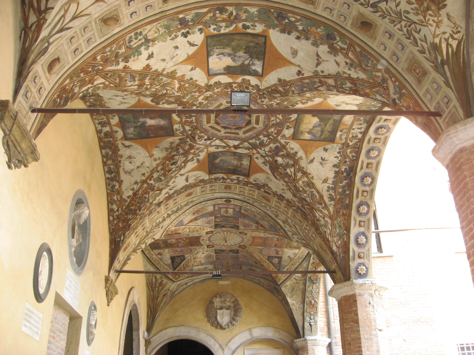 Palazzo Chigi Saracini